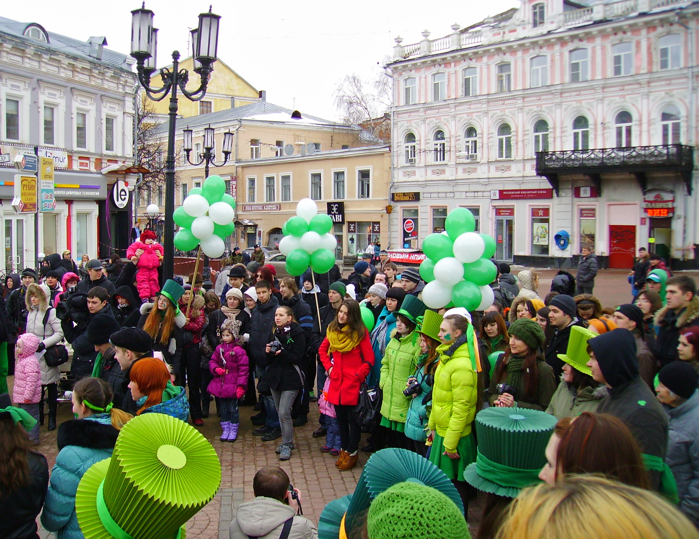 Нижний Новгород. Празднование дня Святого Патрика.